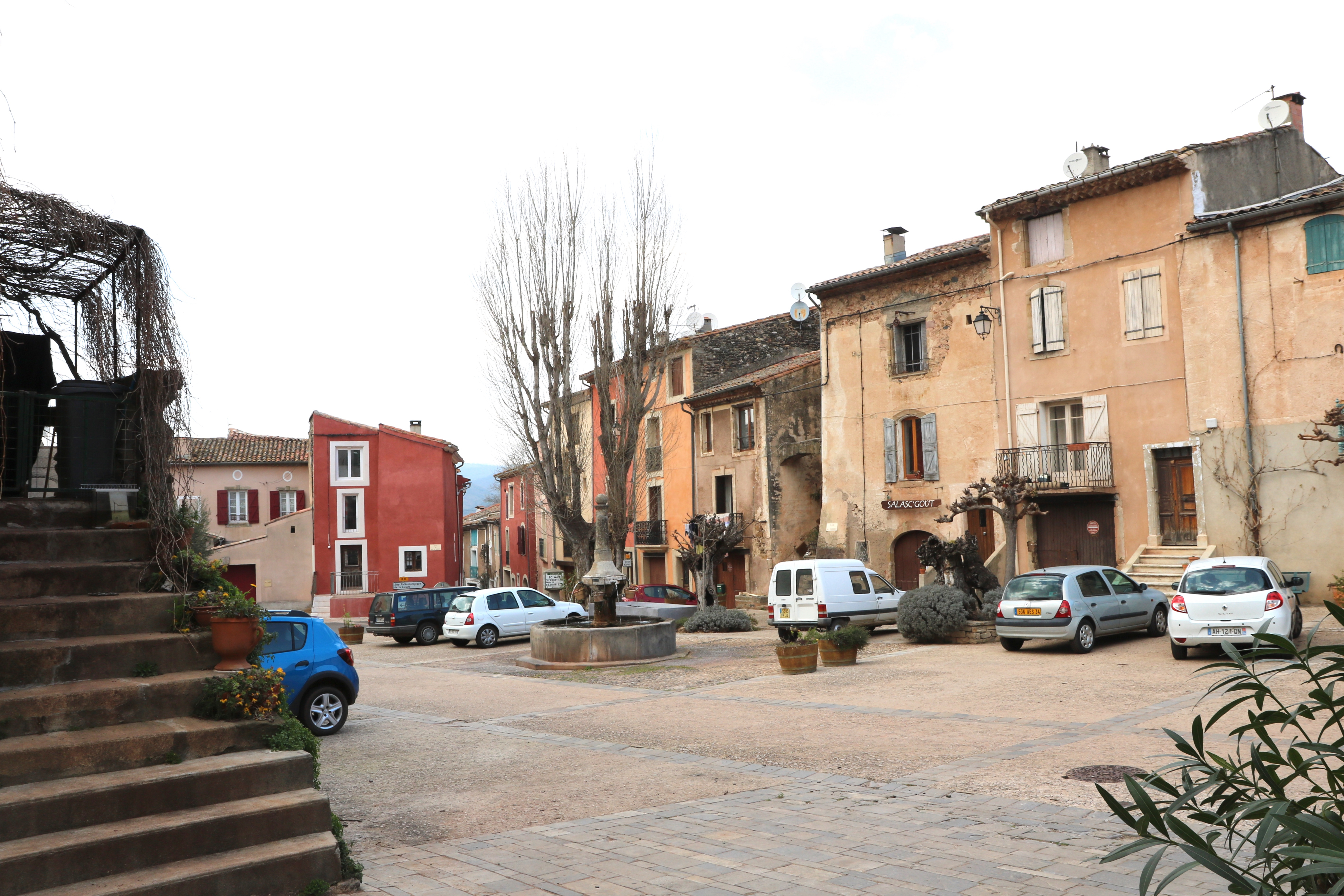 Salasc (Hérault, France) - place